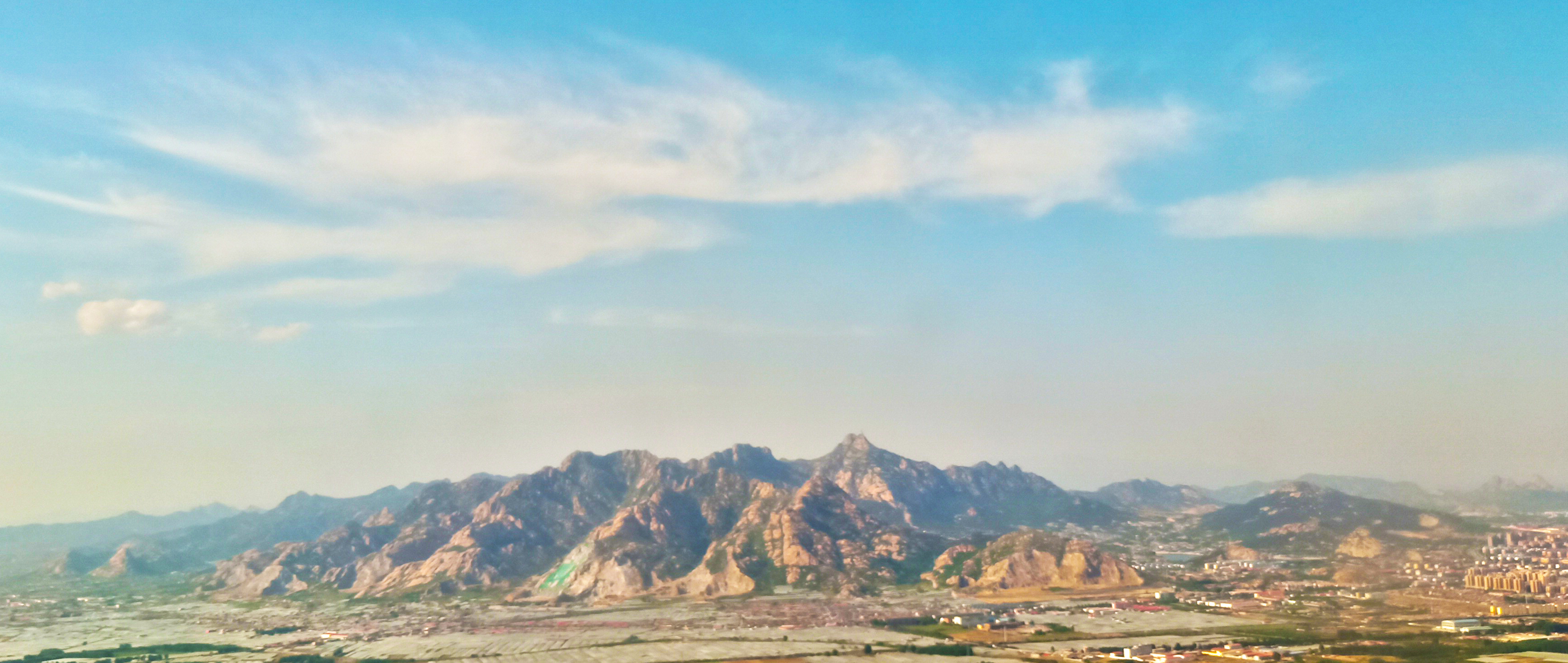 粵語: 喺秦皇島上空睇燕山嗰邊